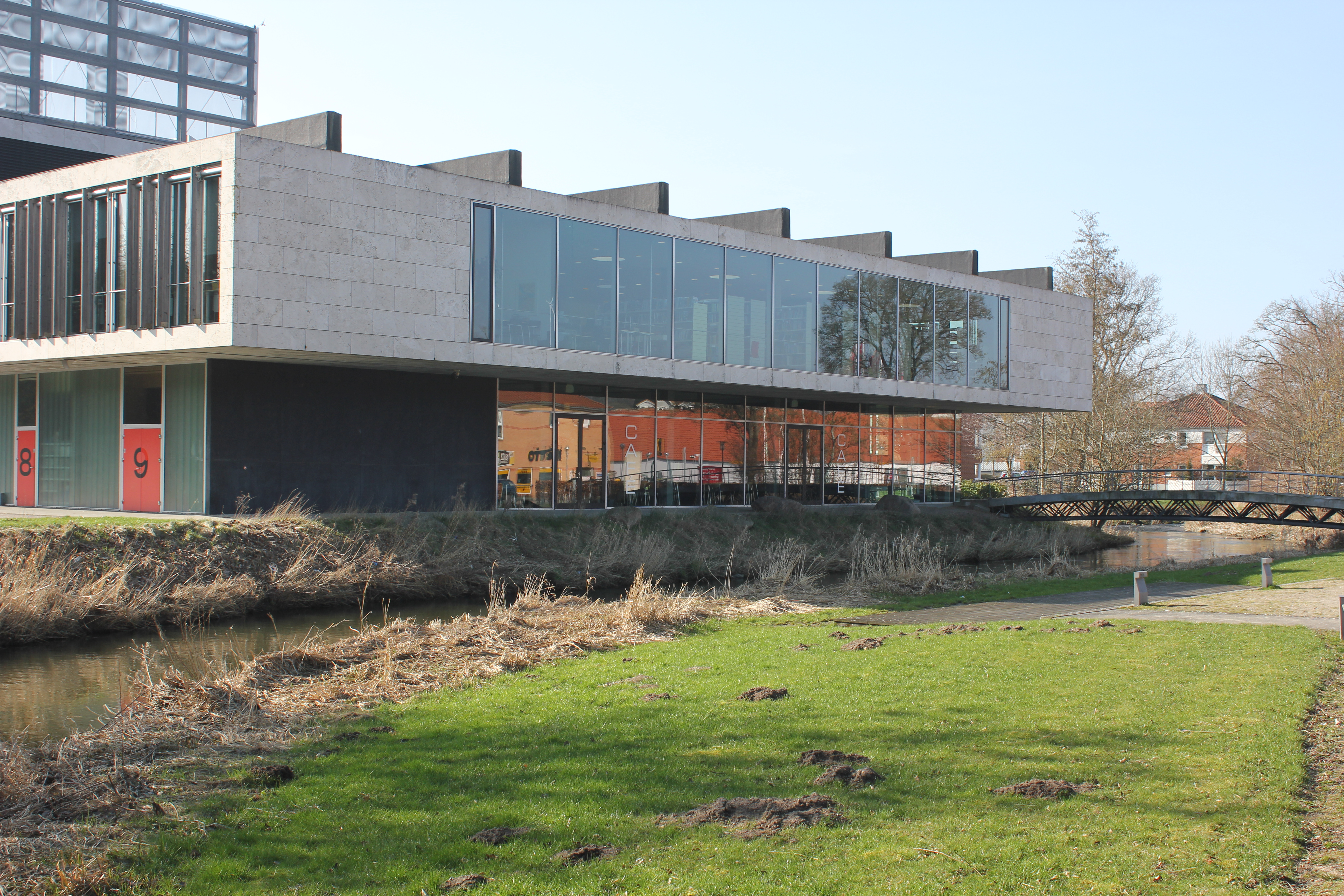 Hadsten Idræts- og Kulturhus Sløjfen i 2014